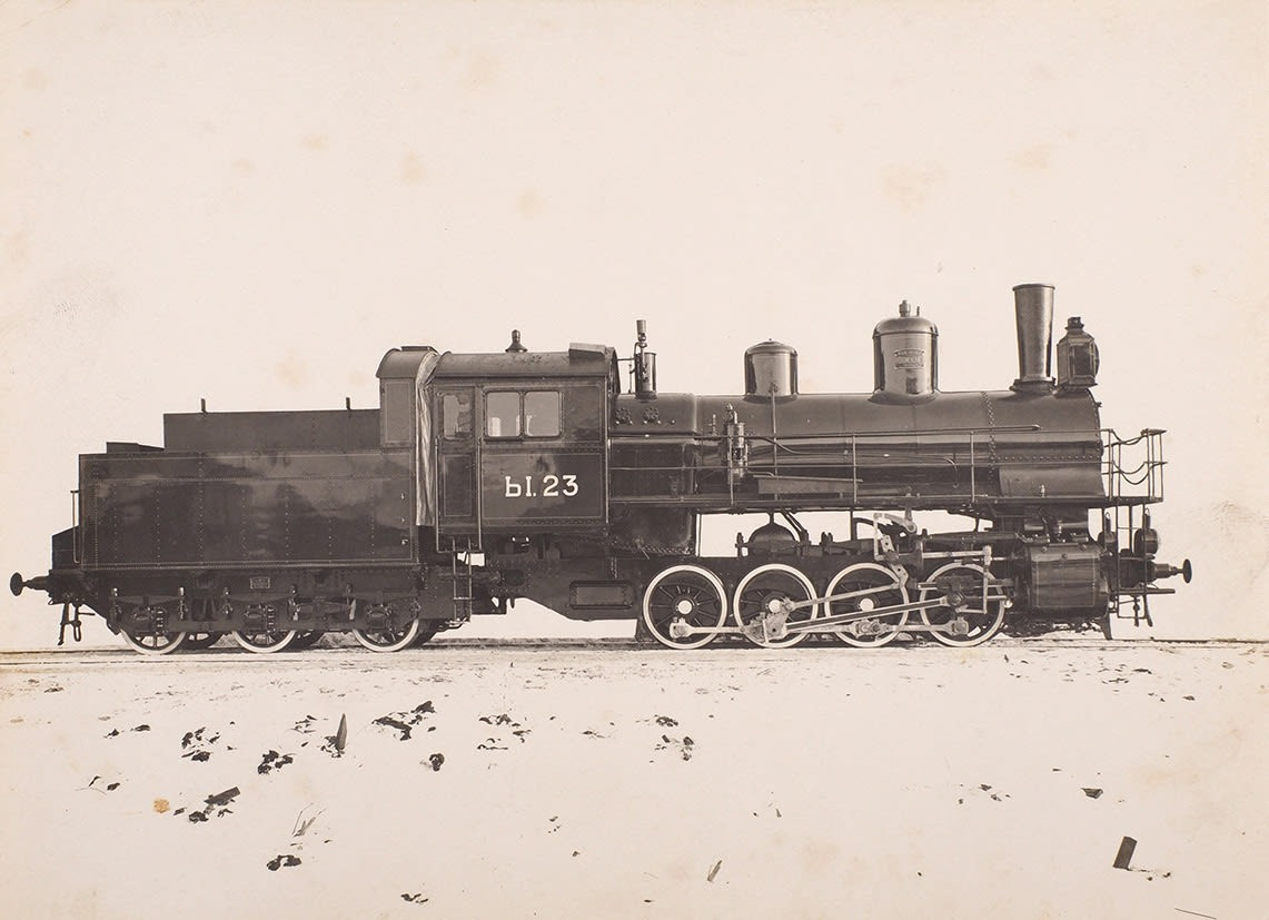 Паровоз Ы на Северо-Кавказской железной дороге